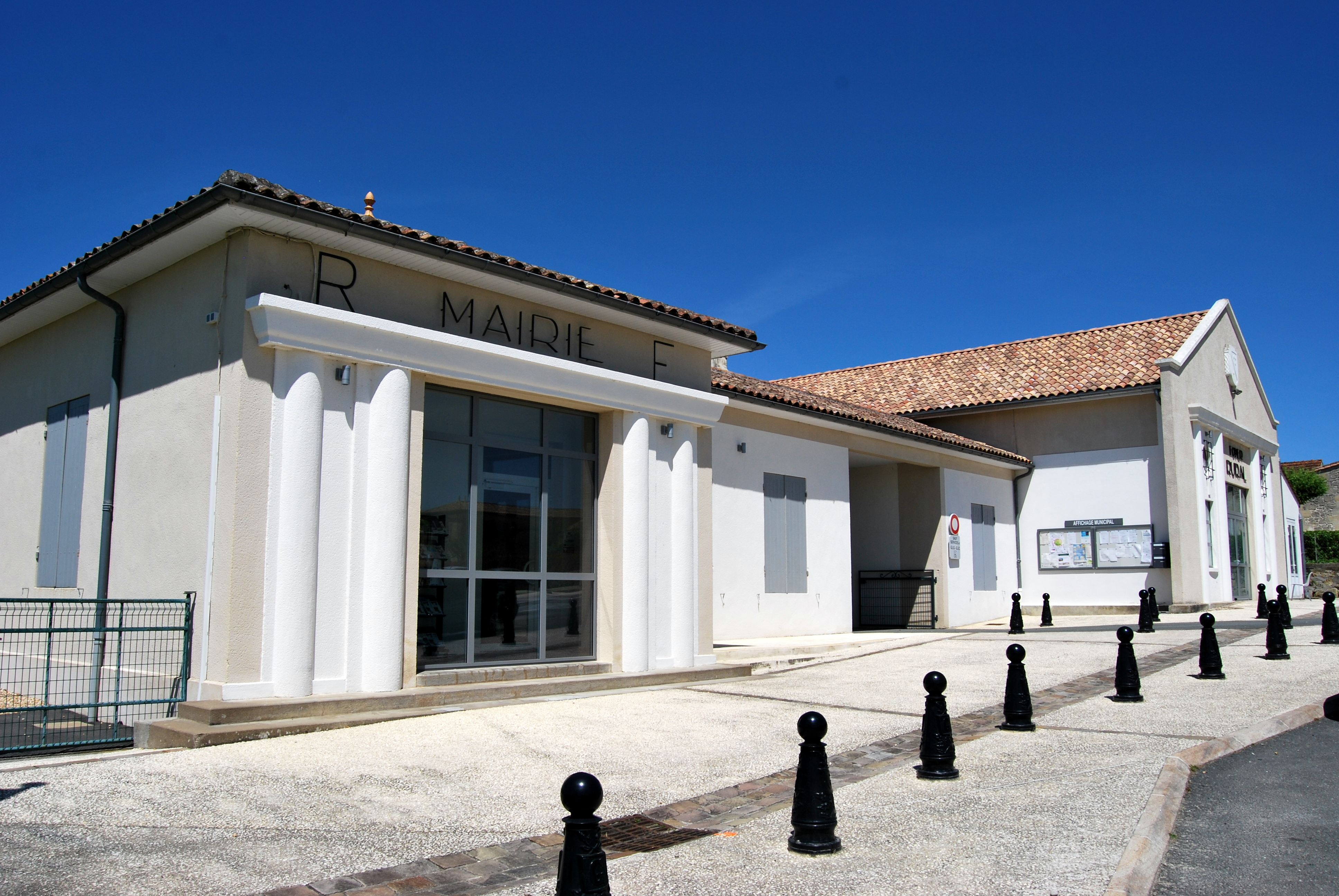 Grézillac Mairie